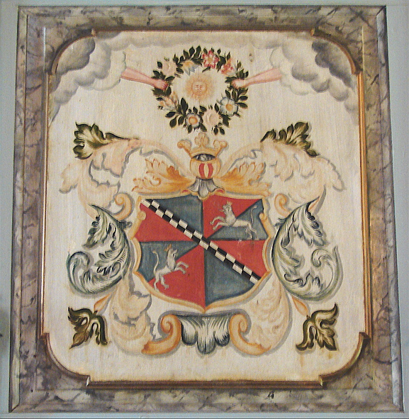 Anne Beate Rosenkrantz' (1707–1777) våben fra Solum Kirke, Skien, Norge